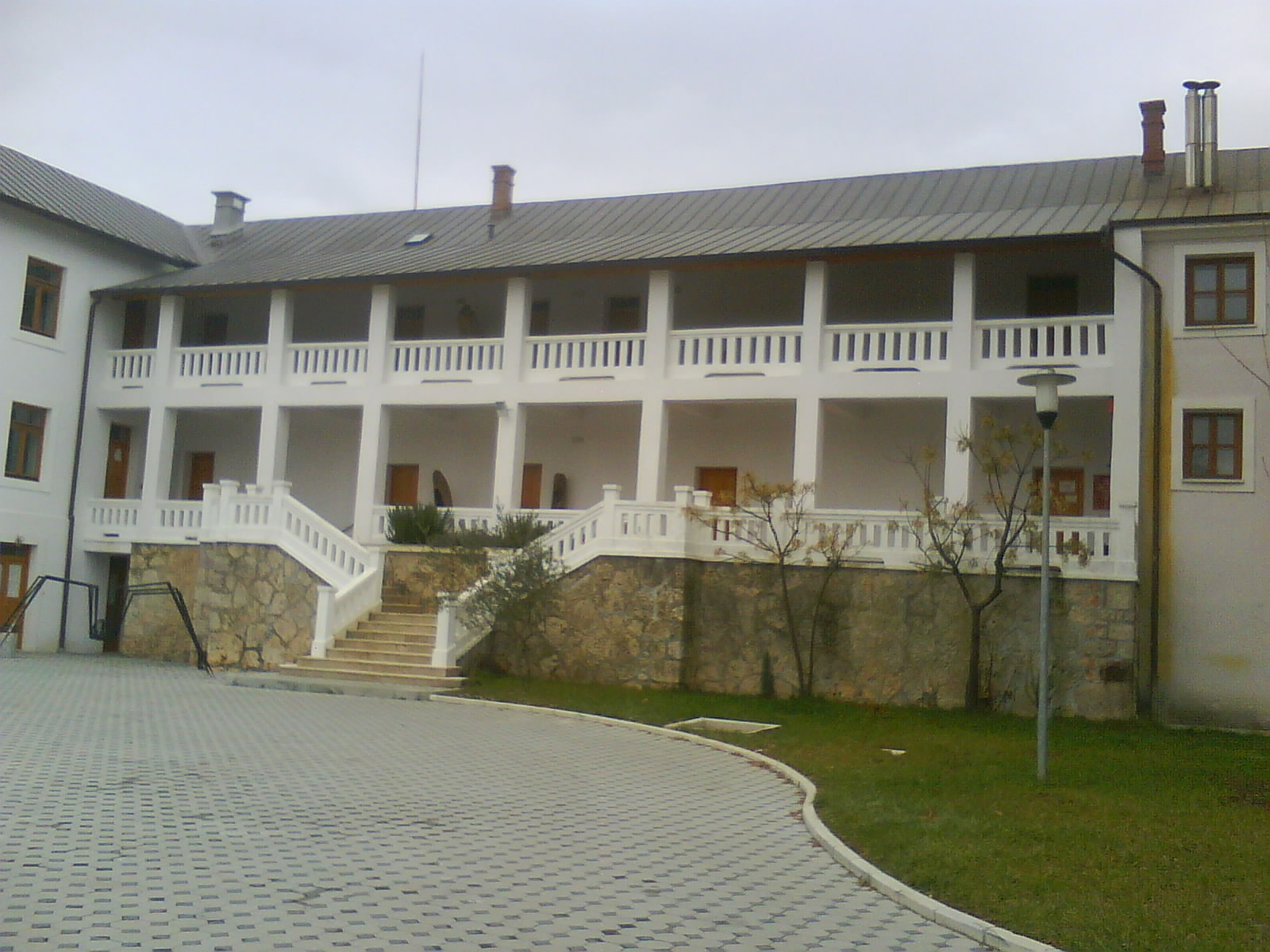 Academy of Arts in Široki brijeg